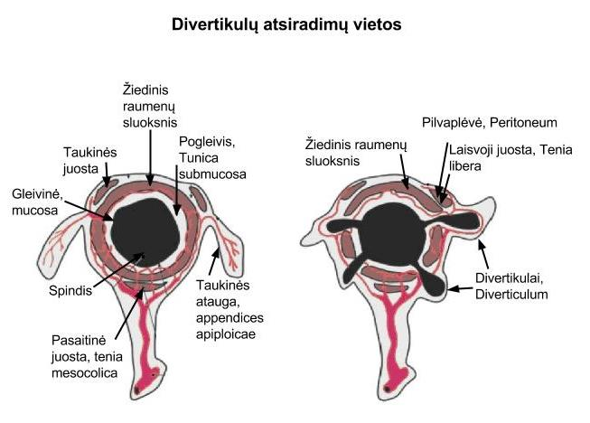 Divertikulų atsiradimo vietos